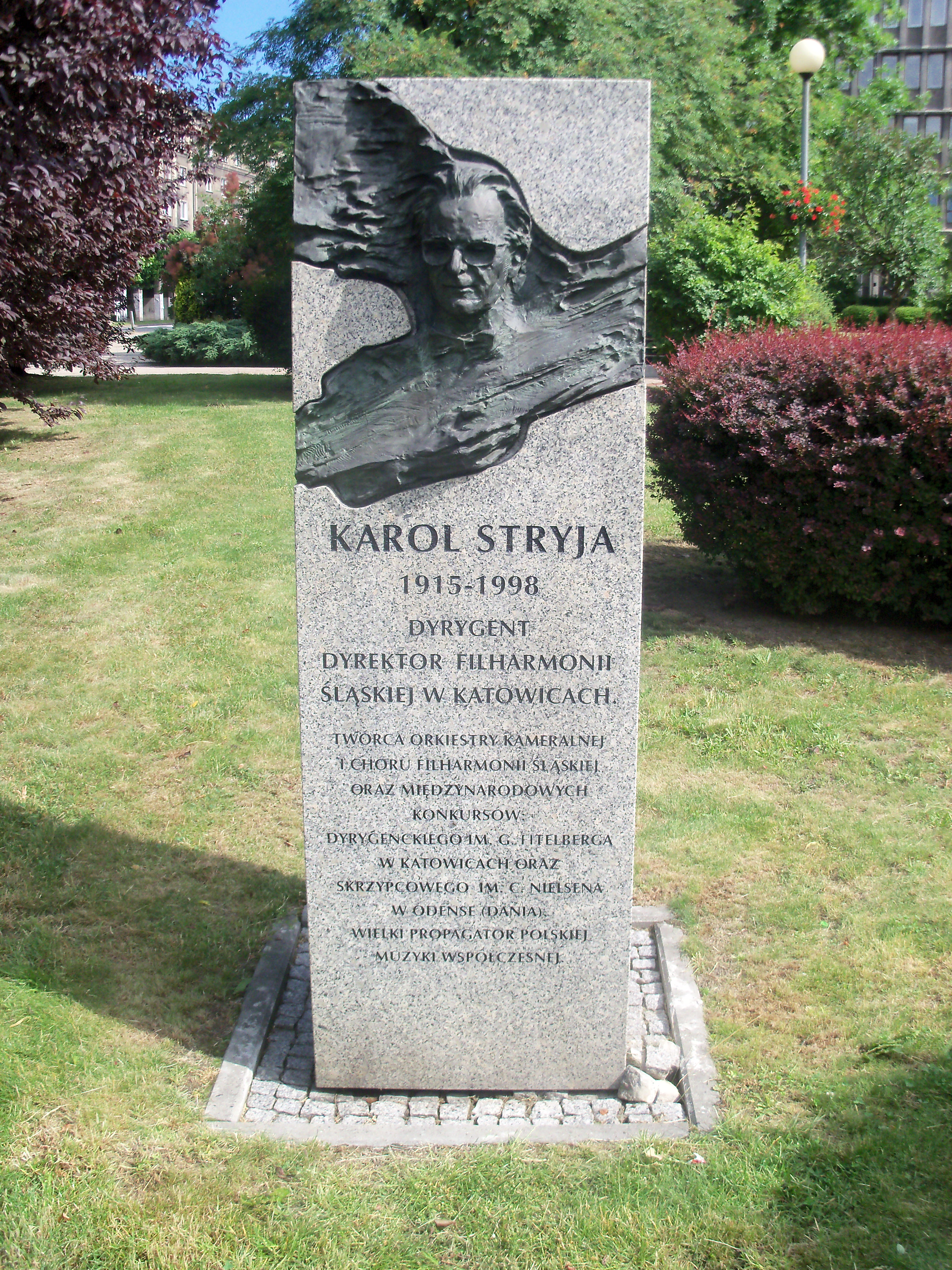 Galeria Artystyczna na placu Grunwaldzkim w Katowicach: Rzeźba przedstawiająca Karola Stryję